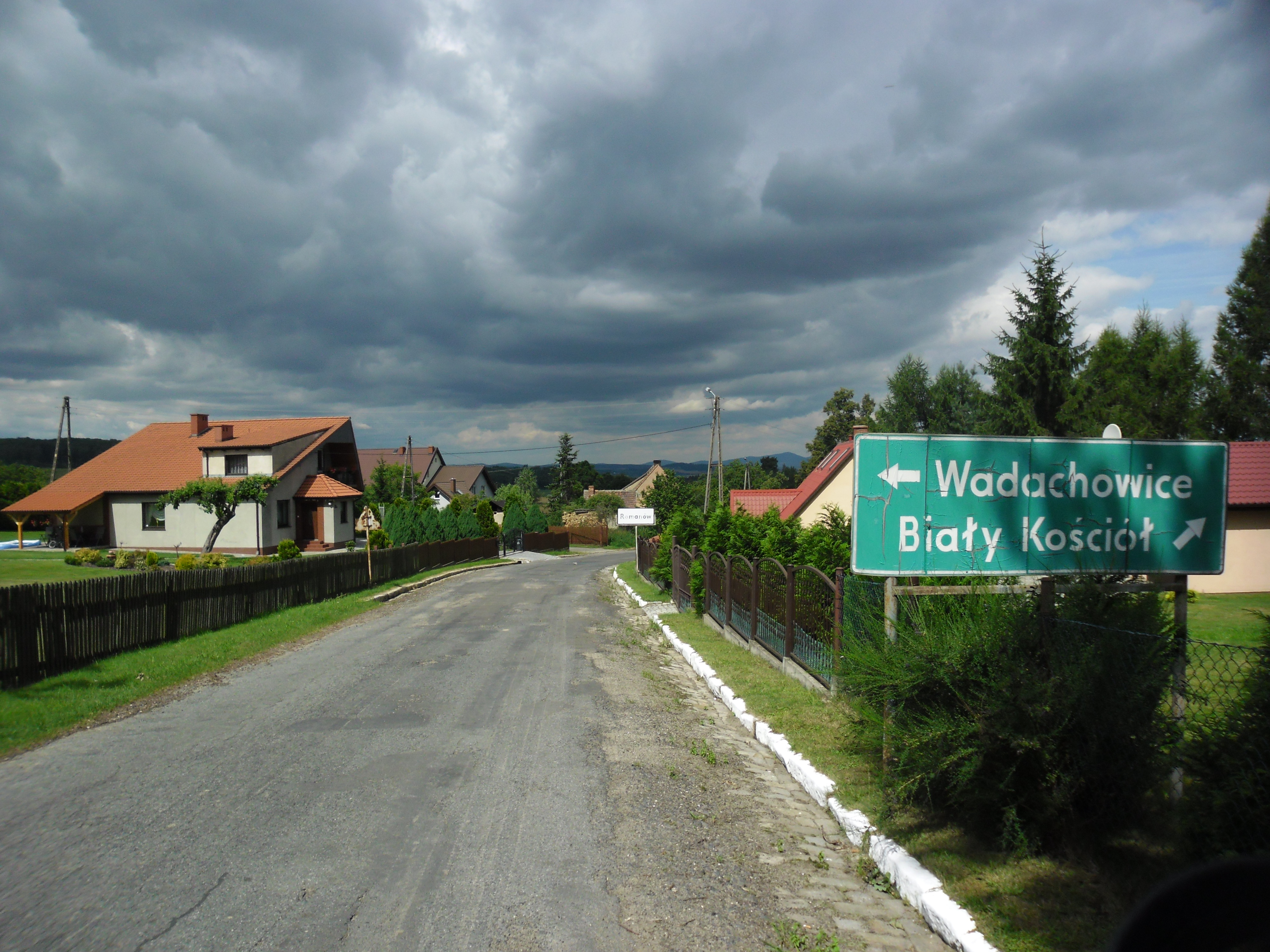 Wieś Romanów w gminie Przeworno